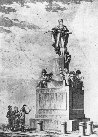 Monumento a Fernando VII (1831), de Pierre Joseph Chardigny d'Aix, Pla de Palau, Barcelona, destruido en 1835.